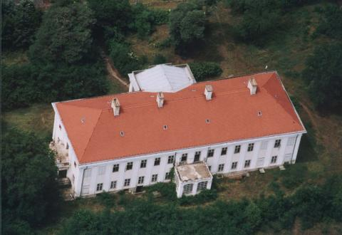 Nyírábrány, Eördögh Mansion, Hungary aerialphotography